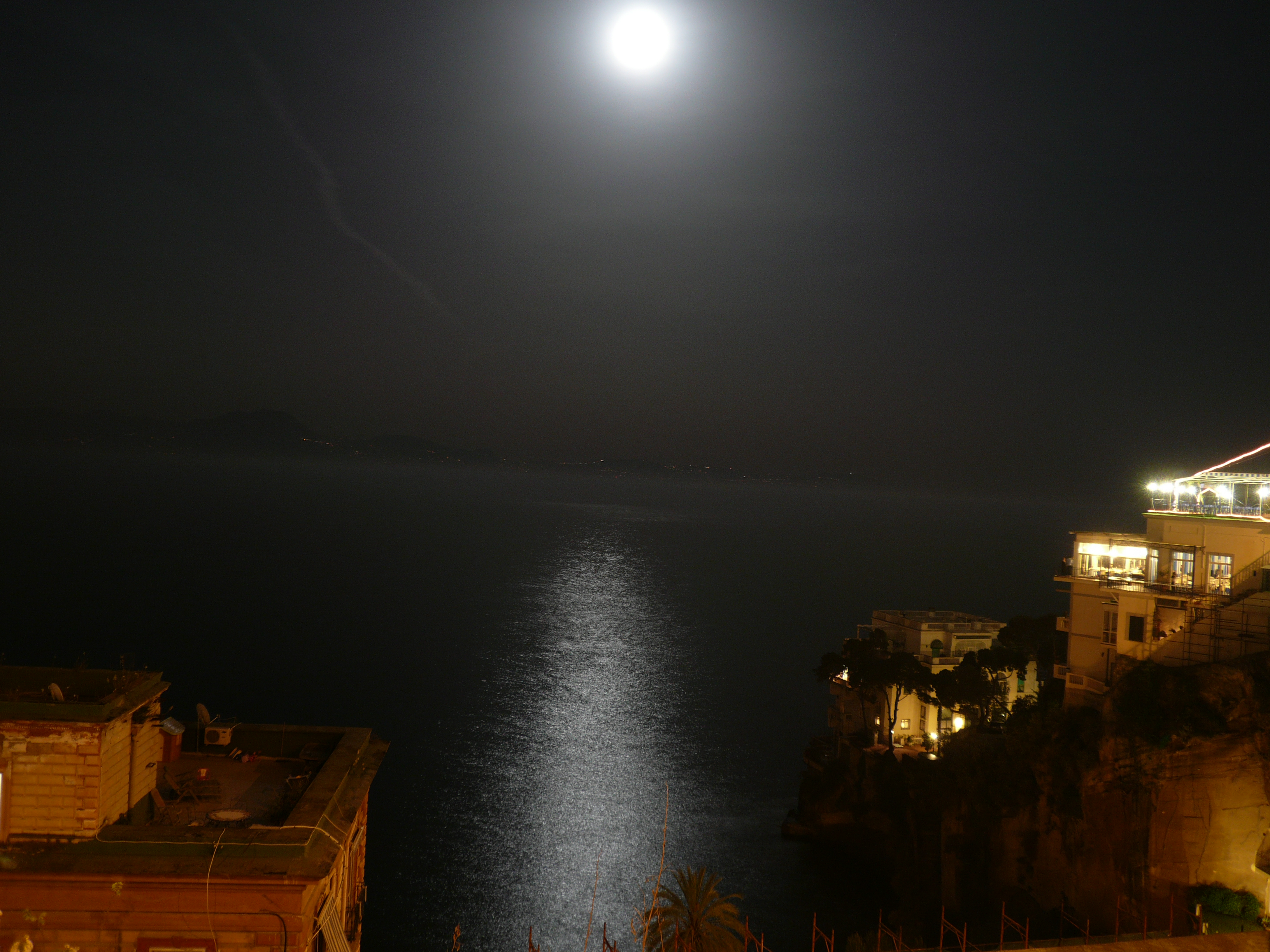 Veduta da via Posillipo (Napoli). Autore foto: Roberto De Martino